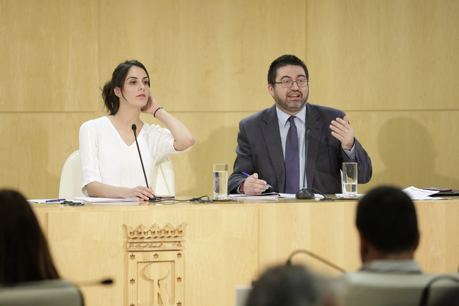 La Junta de Gobierno ha aprobado hoy, jueves 16 de marzo, el Plan Económico Financiero (PEF) para 2017-2018, que pasará por la Comisión Ordinaria de Economía y Hacienda y se elevará al Pleno de este mes para su aprobación definitiva. El PEF será remitido a continuación al Ministerio de Hacienda y Función Pública.